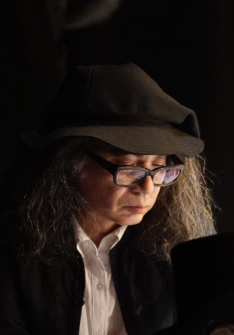 2015年6月17日club asia